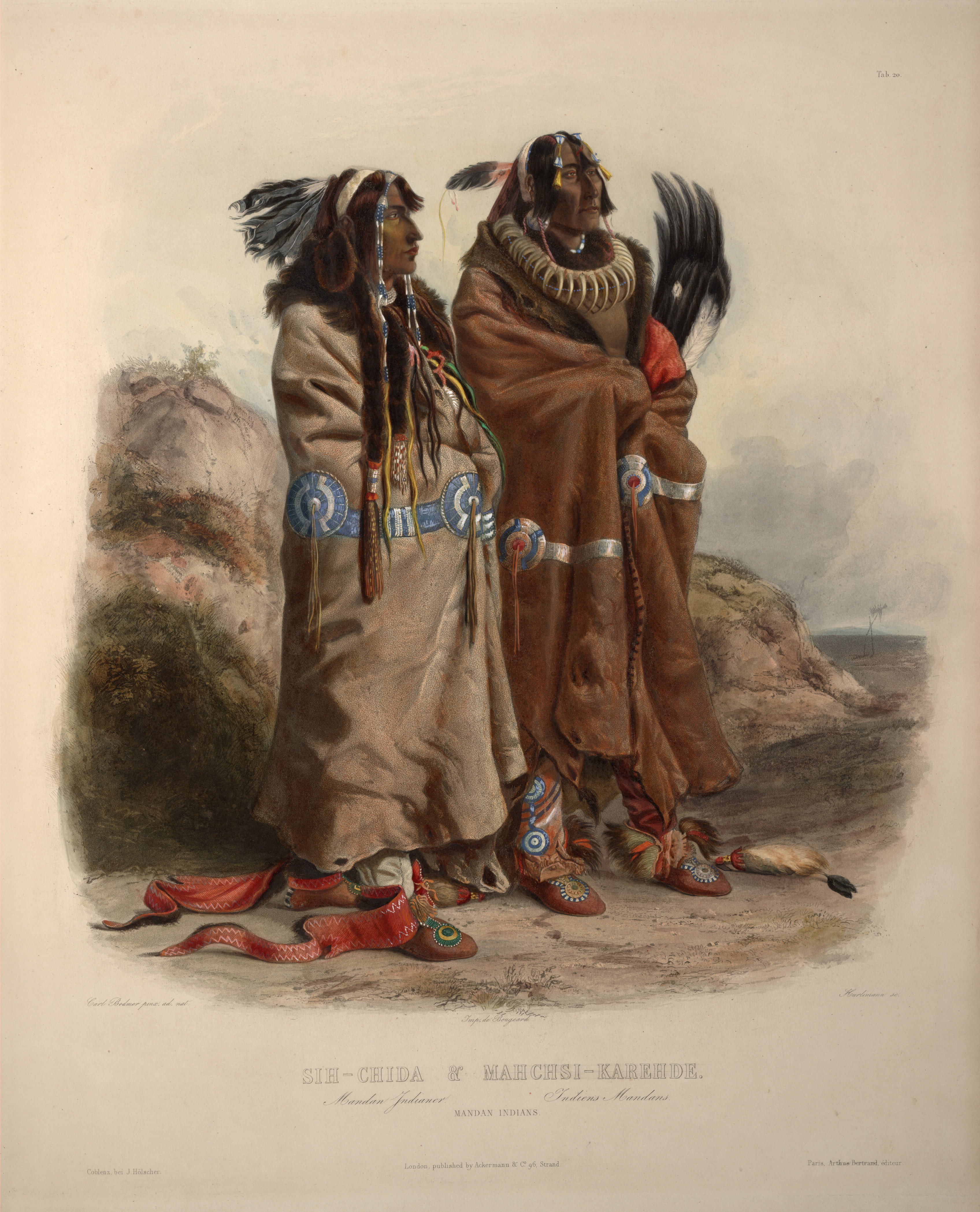 Mandan indians